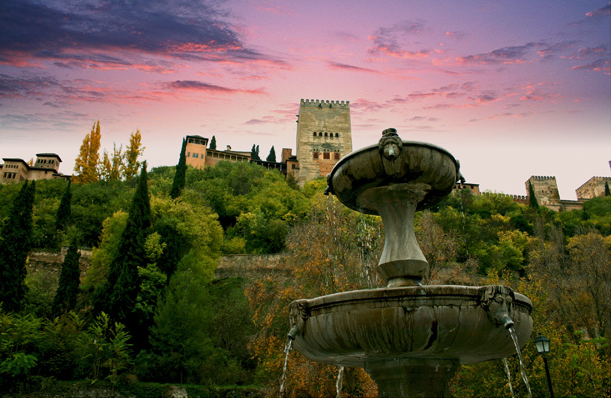 Alhambra de Granada, España